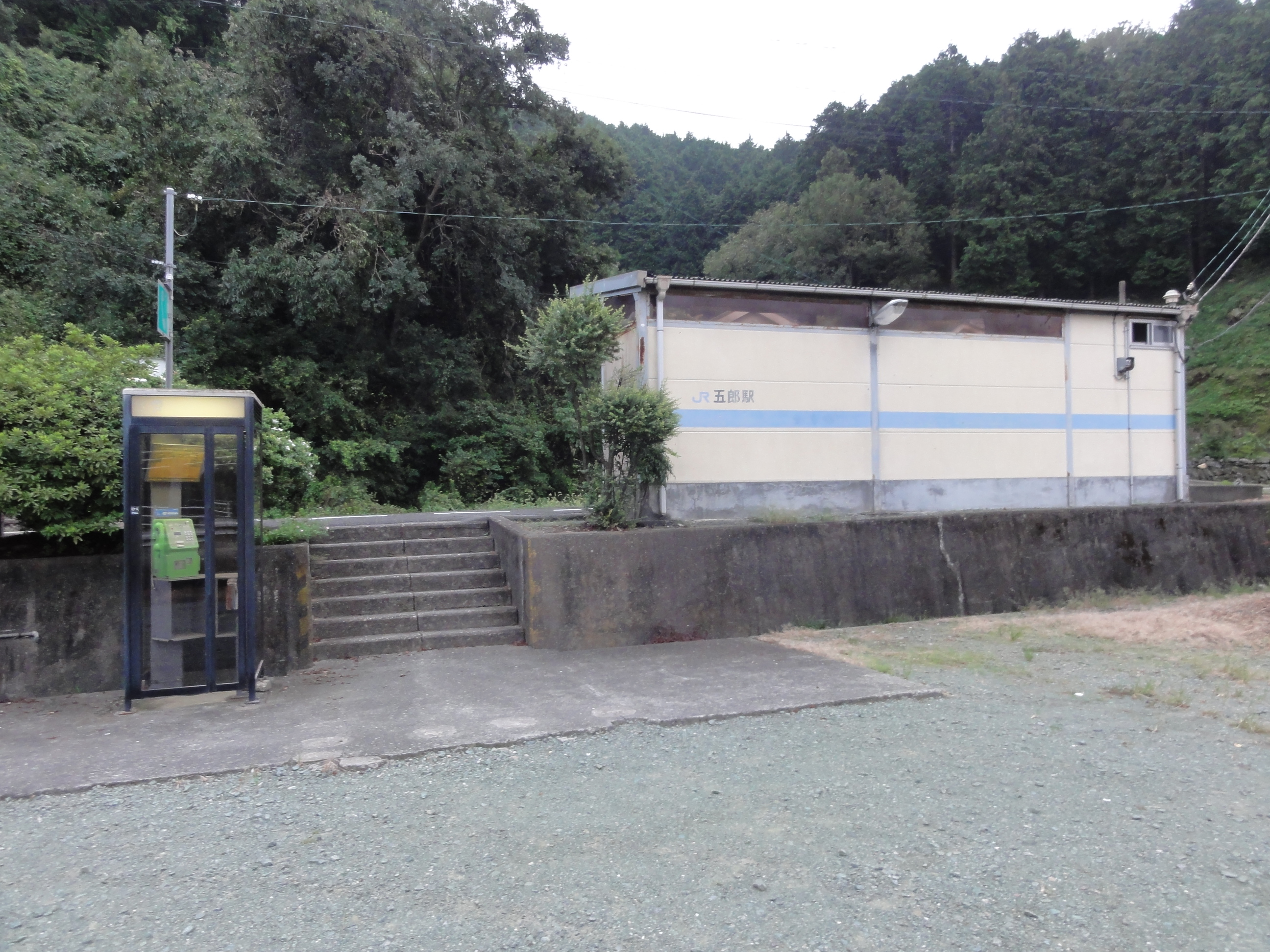 五郎駅